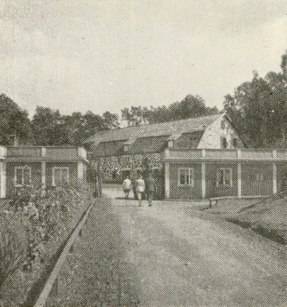 Ingången till brukets verkstad. Fotografi från uppskattningsvis 1930-tal.